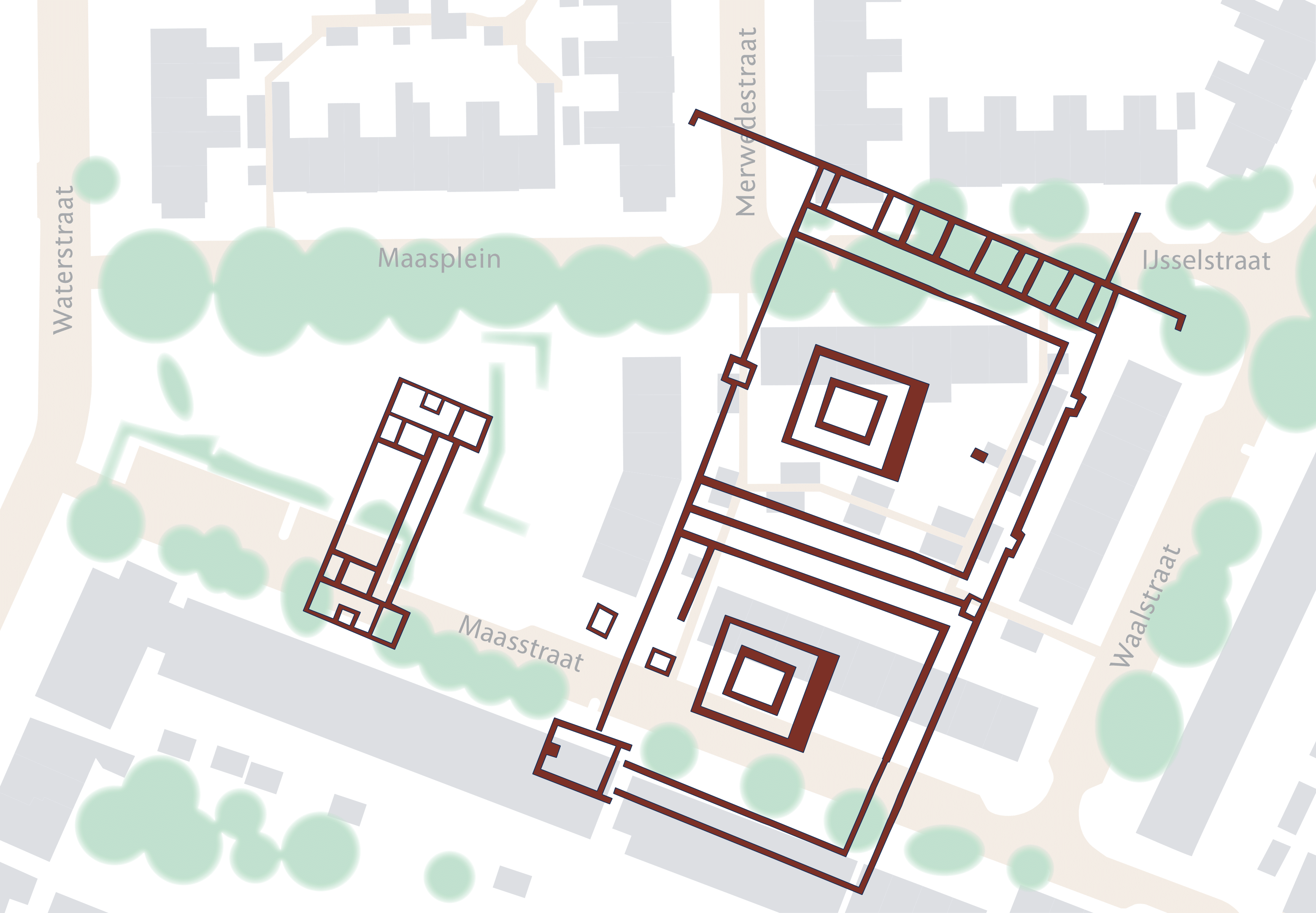 kaart Mercurius en Fortuna met bomen, Maasplein, Nijmegen, Nederland